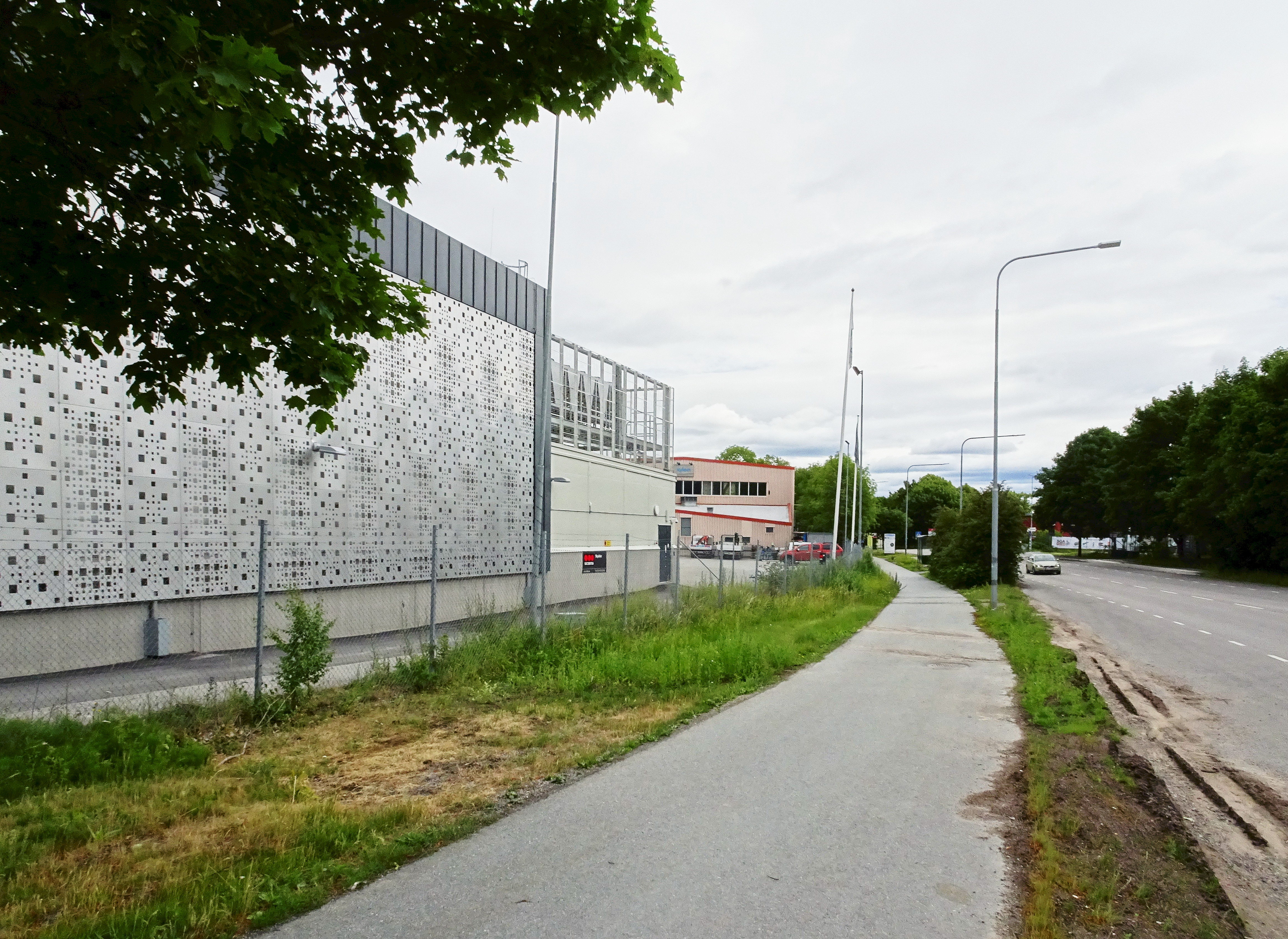 Veddestavägen